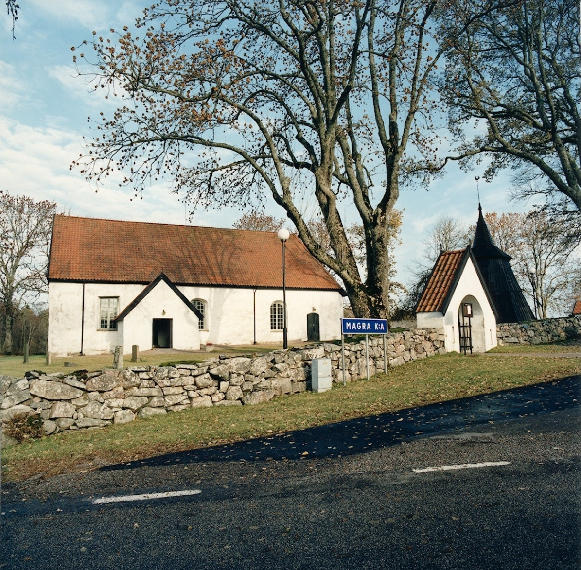 Exteriör. Magra kyrka Före renoveringen 1999-2000.